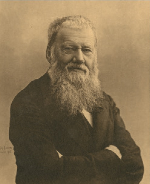 Marc Thury, professeur ordinaire en sciences, université de Genève, 1900